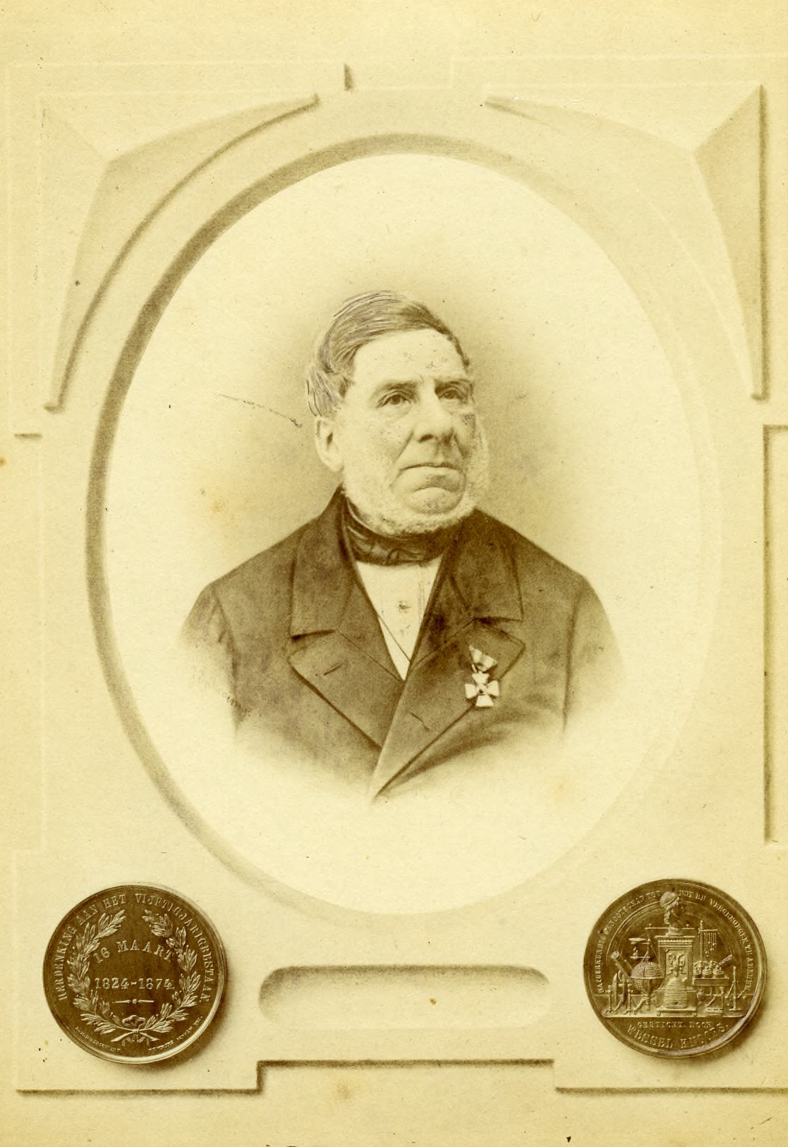 Wessel Knoops met medaille en penning, gekregen bij het 50-jarig bestaan van het Natuurkundig genootschap dat later naar hem genoemd zou worden.